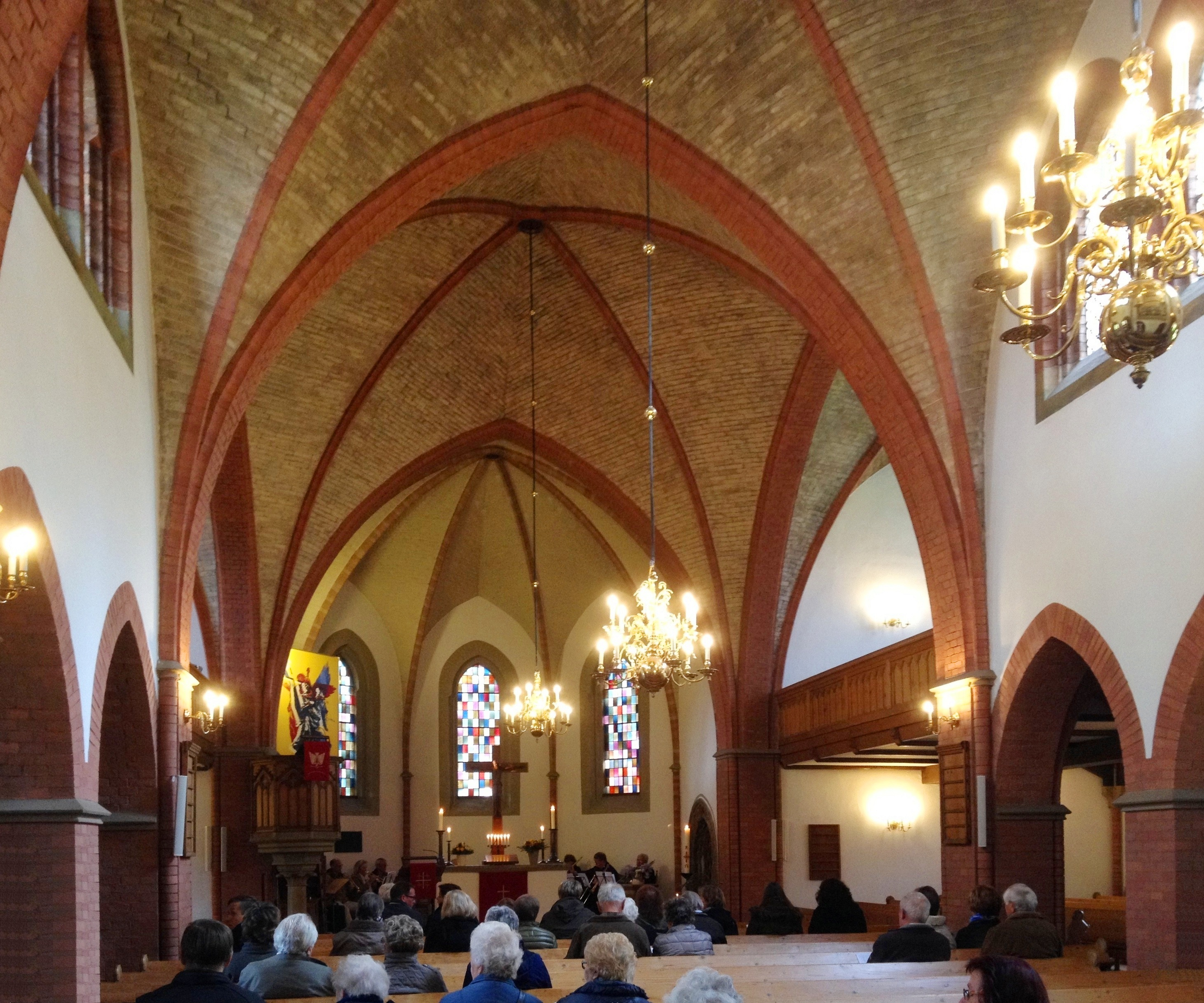 Liebenburg, ev.-luth. Kirche St. Trinitatis